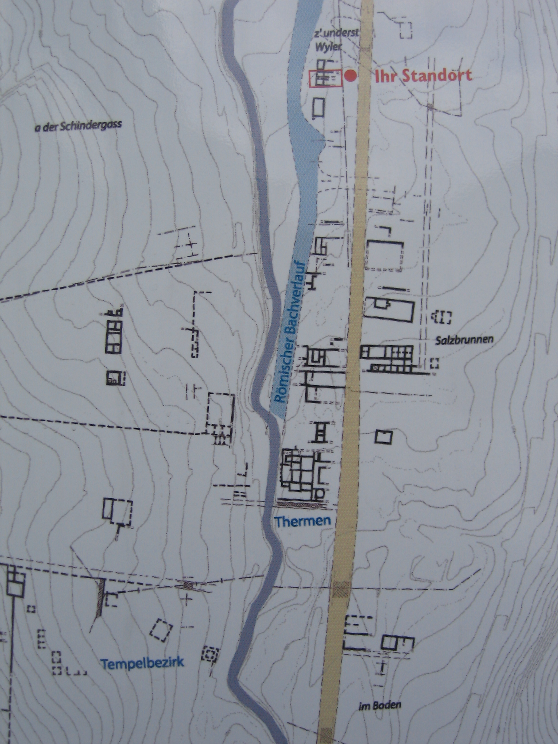 Plan der römischen Ausgrabungen in Juliomagus (Schleitheim, Schweiz) entlang des Zwerenbaches.